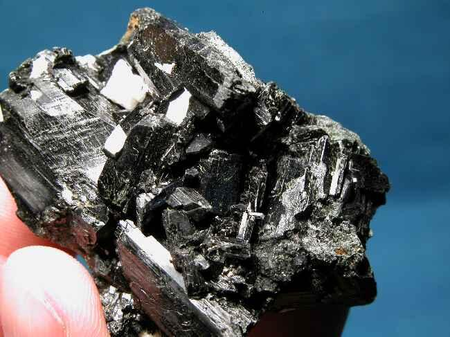 egiryn, pochodzenie Malawi; autor zdjęcia Piotr Menducki